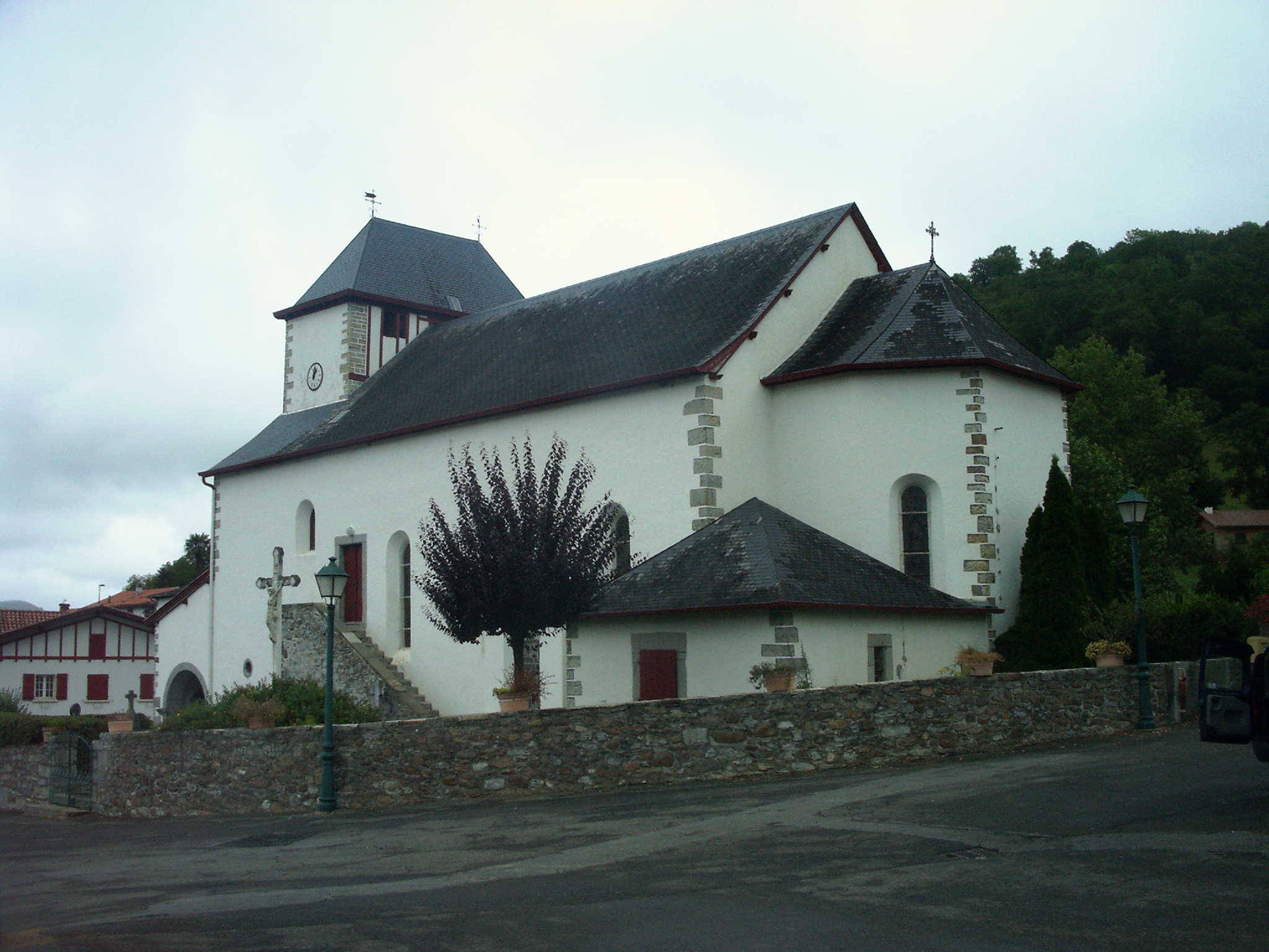 Donaixtiko eliza